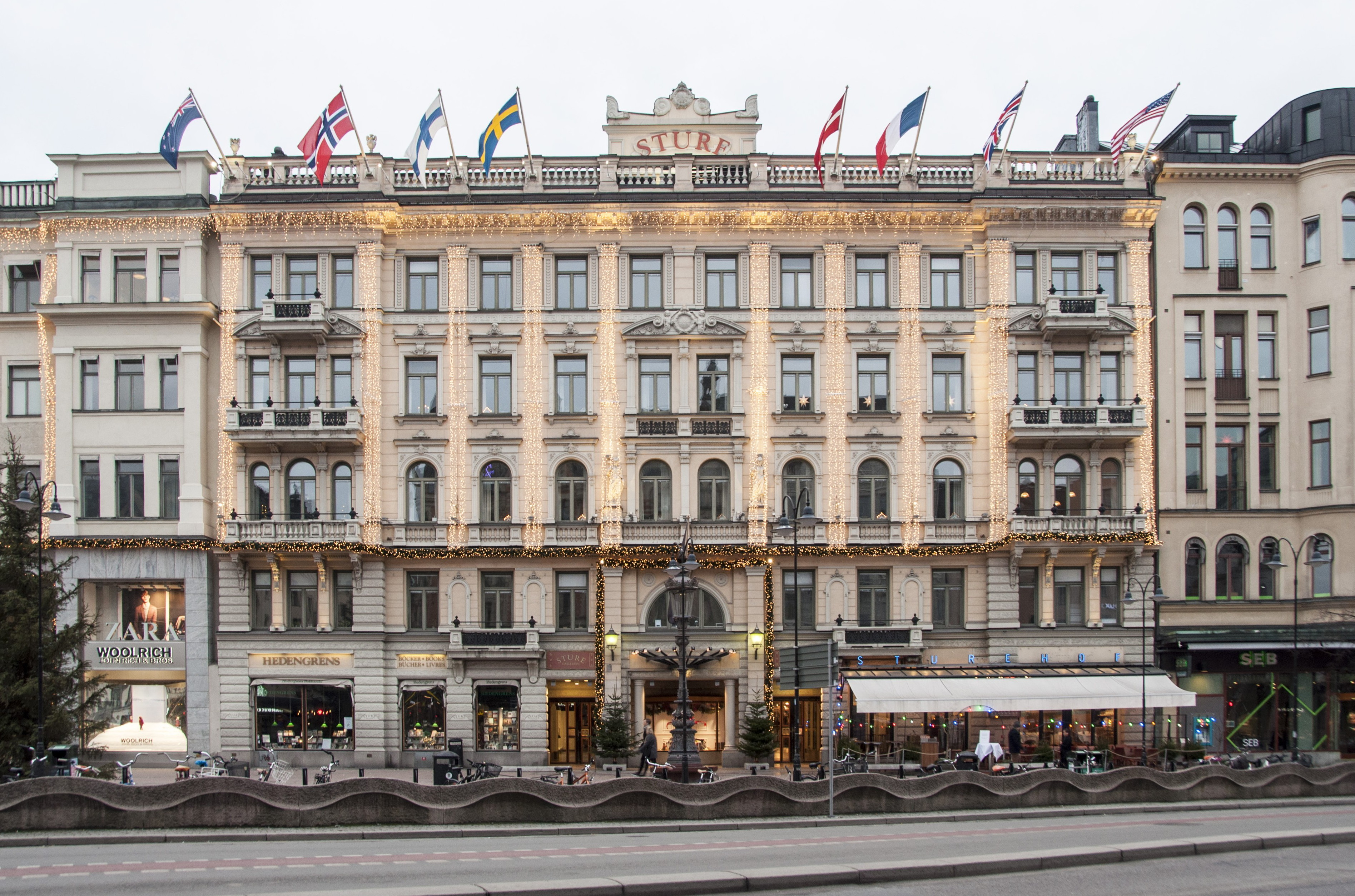 Sperlingens backe 56, Stureplan 4, Nybyggnadsår 1886 - 1887 Edward Ohlsson (Arkitekt) J. A. Bång (Byggherre) Lars Larsson (Byggmästare)